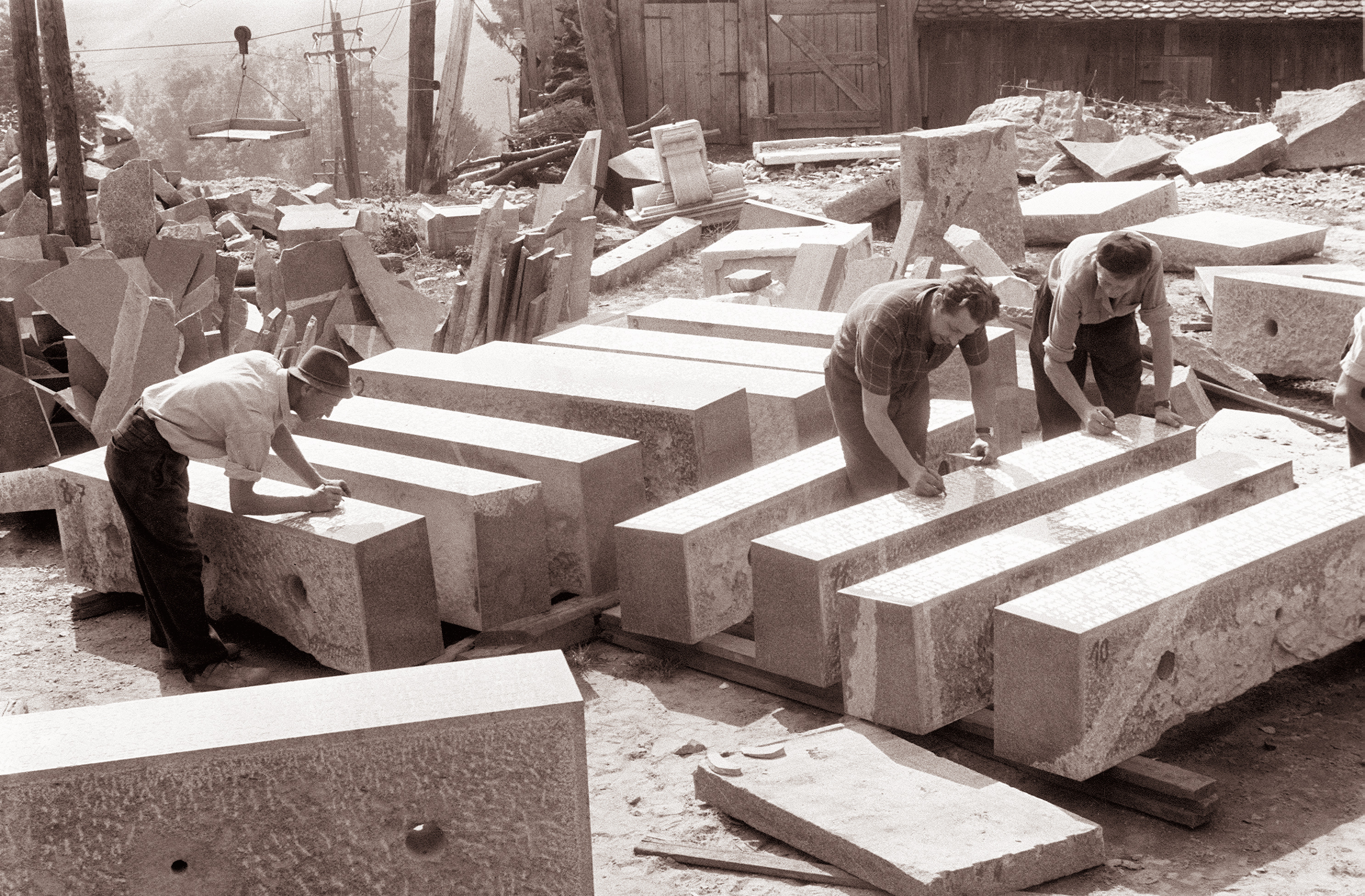 Podjetje Granit v Oplotnici